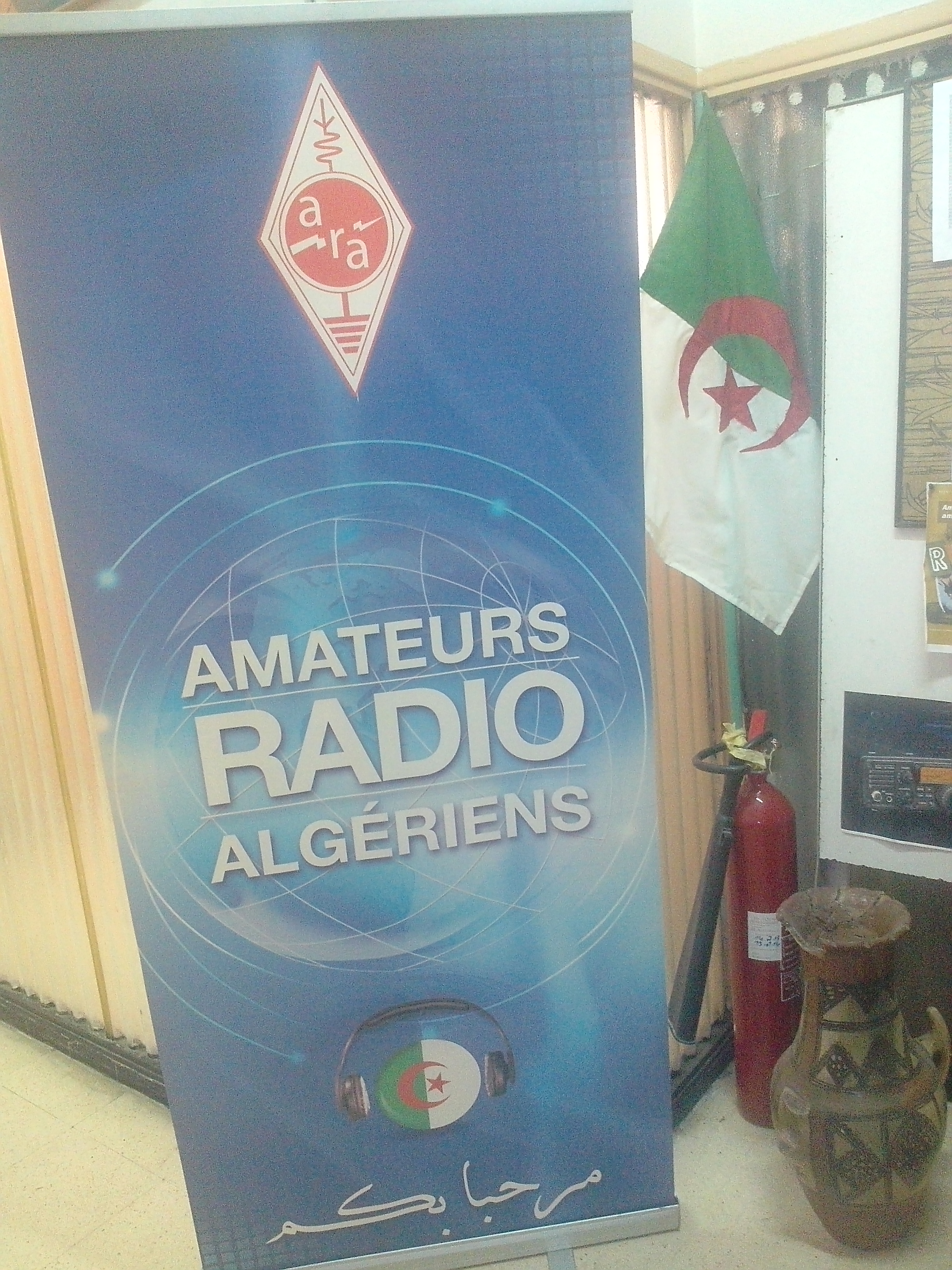 شعار هواة الراديو الجزائريين